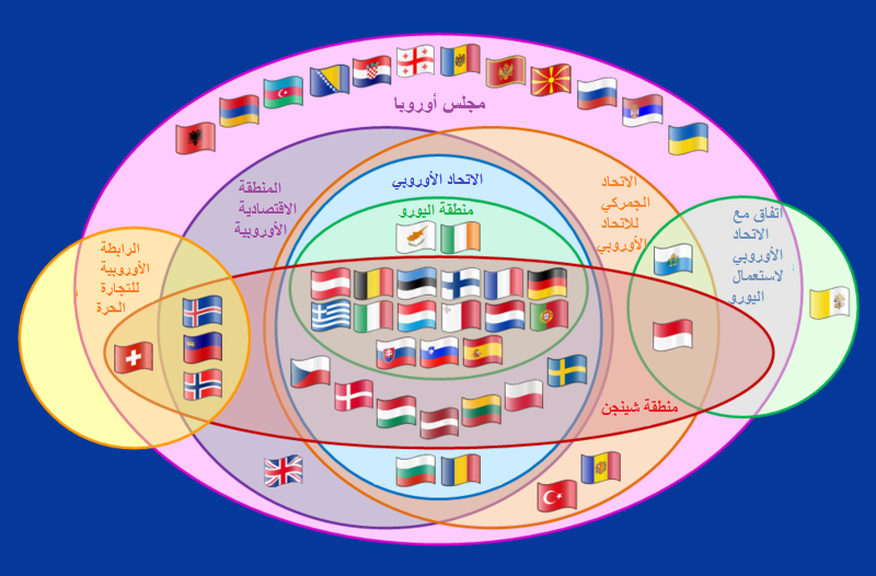 مخطط للمنظمات و الهيئات الأوروبية تحتوي على إنتماأت دول أوروبا